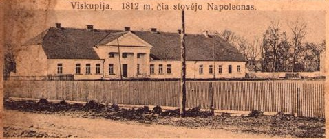 Vilkaviškio dvaro rūmai (1930 m. - vyskupija)